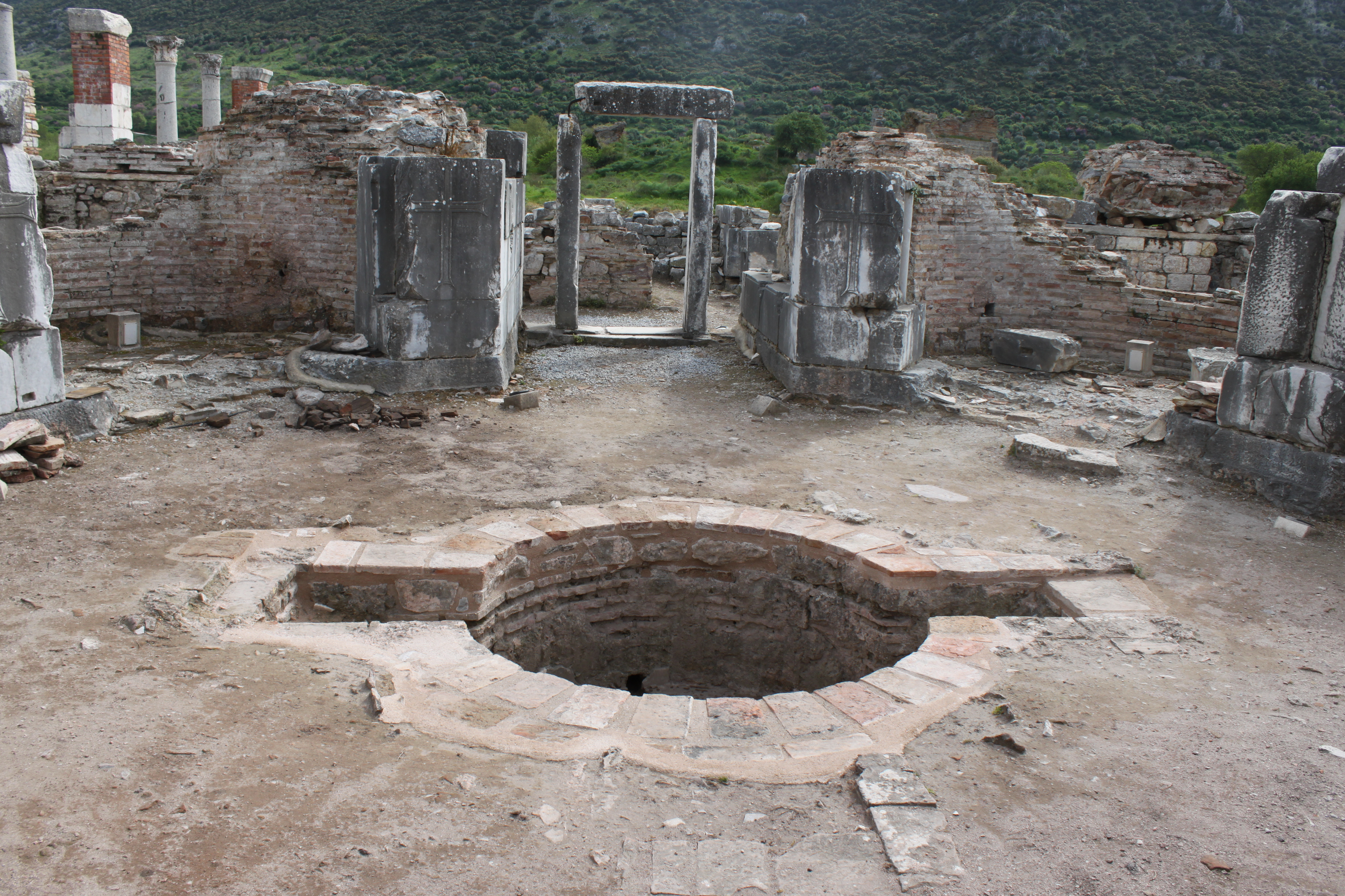 Baptisterium der Marienkirche in Ephesos, Türkei